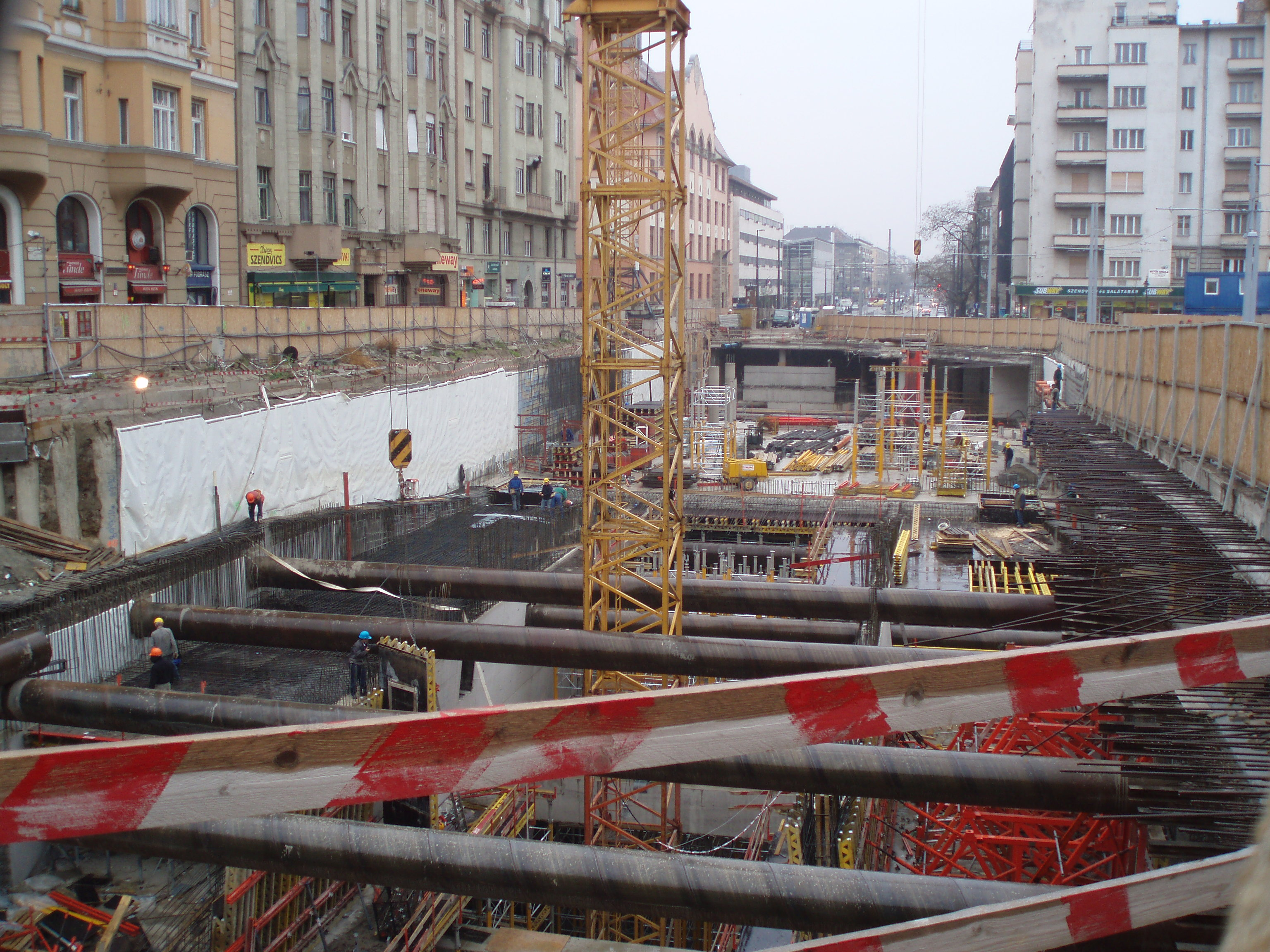 A 4-es metró Móricz Zsigmond körtéri állomásának építése 2008. április 7-én (Budapest)